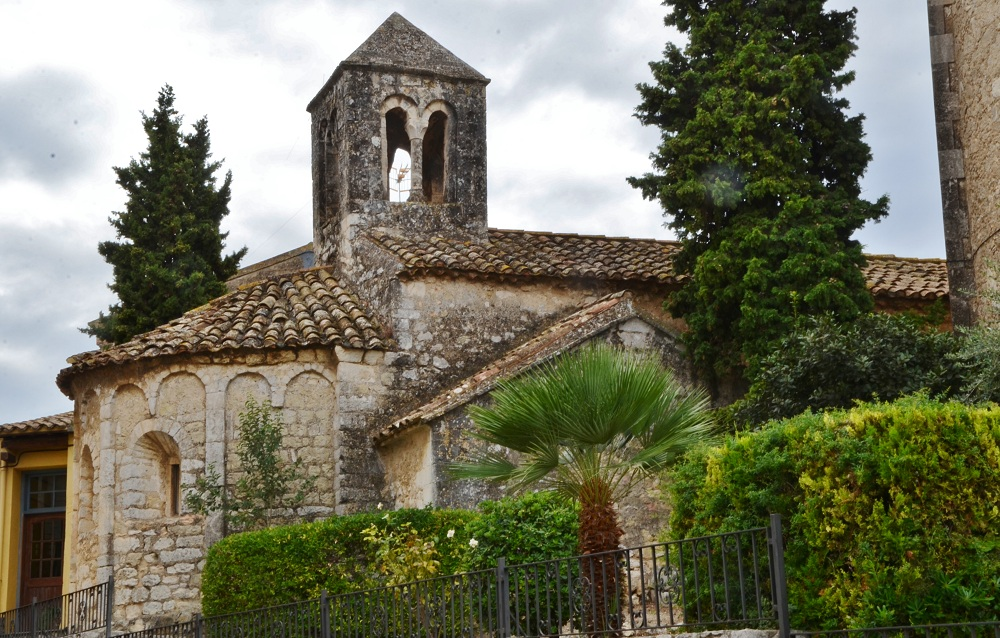 Capella de Sant Esteve de Moja (Olèrdola)